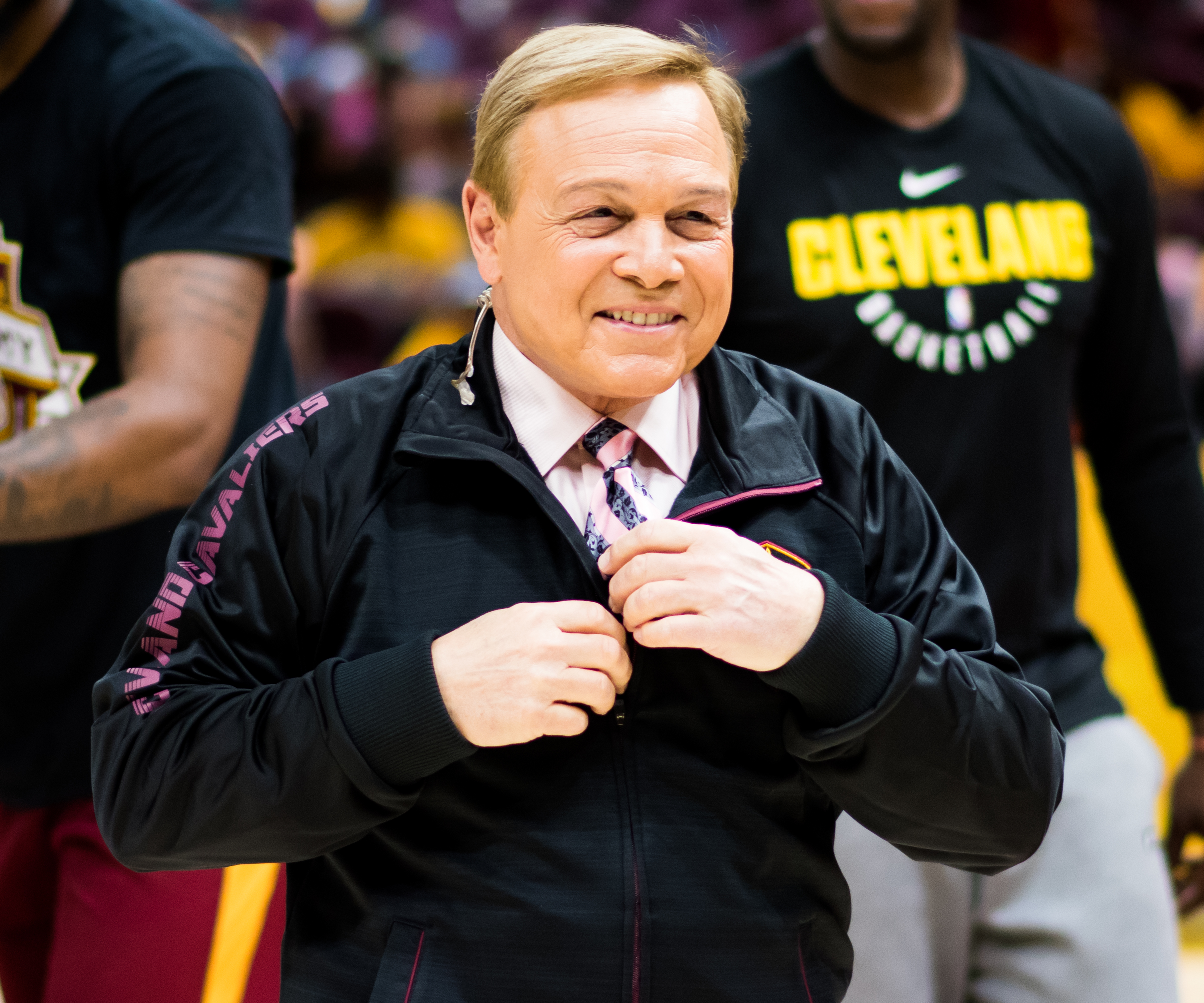 Mike Fratello